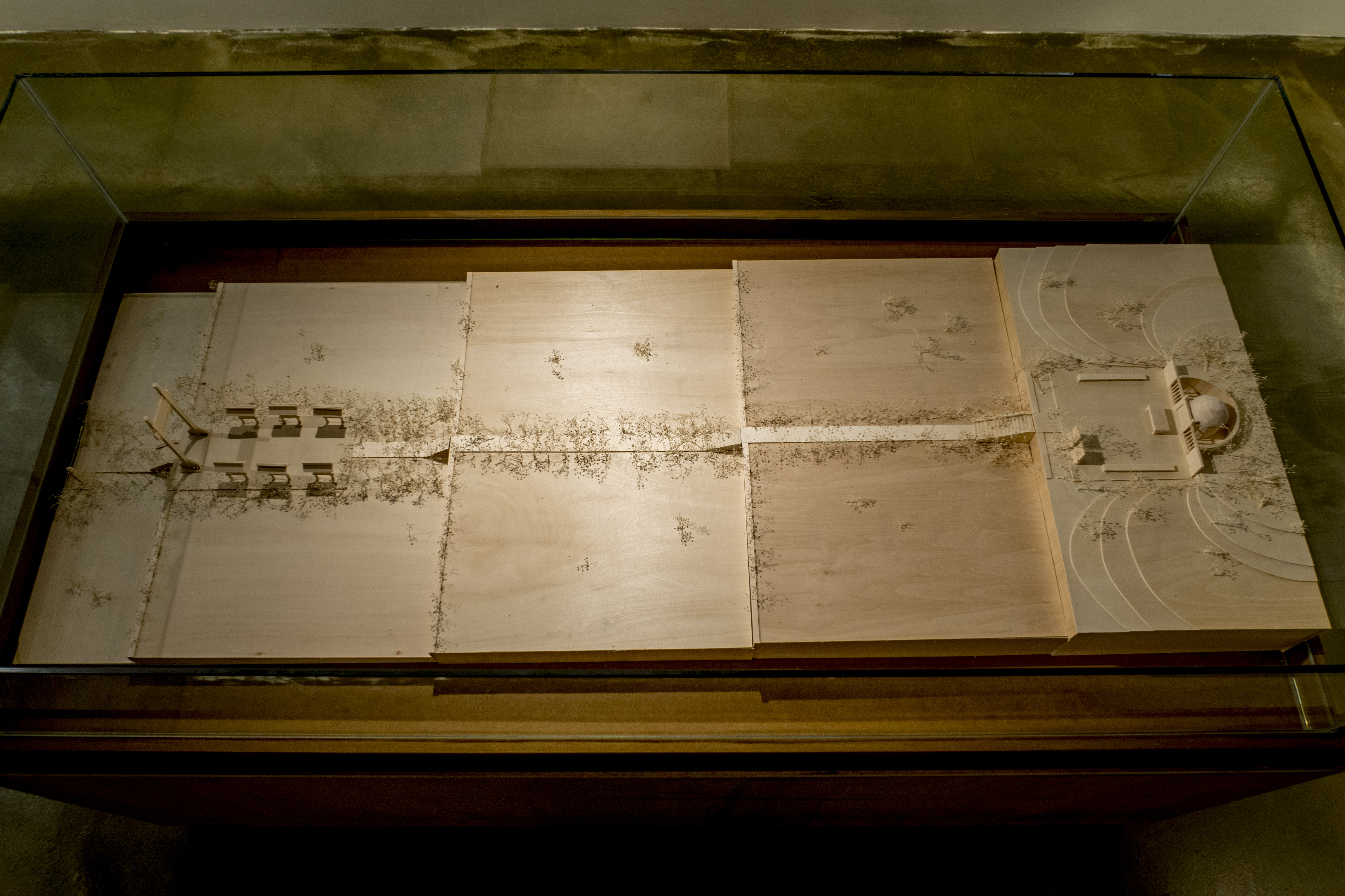 奉化莼湖万斯同墓